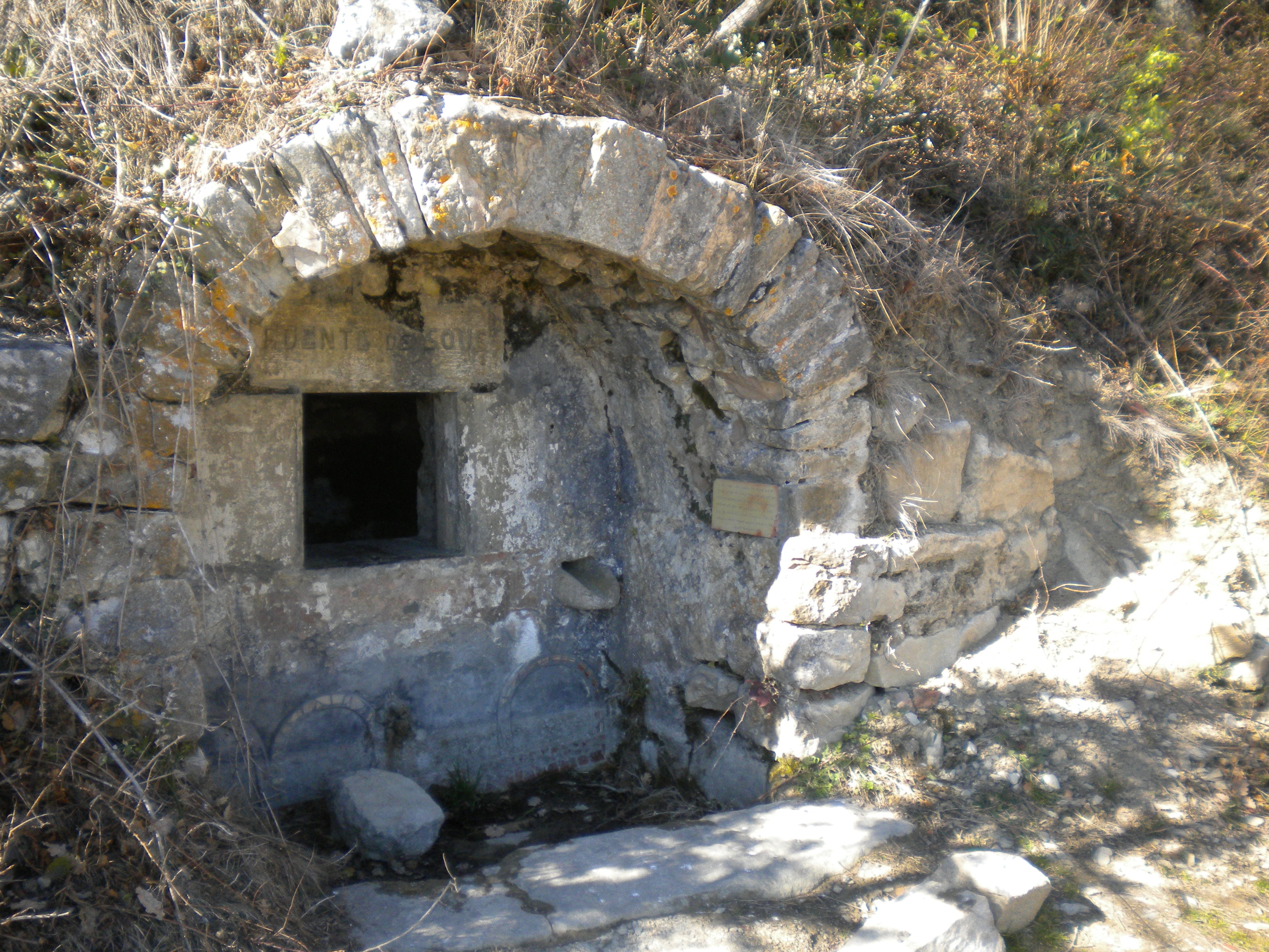 Font de Sous, a tocar del Monestir de Sant Llorenç del Mont. Albanyà, Alta Garrotxa.